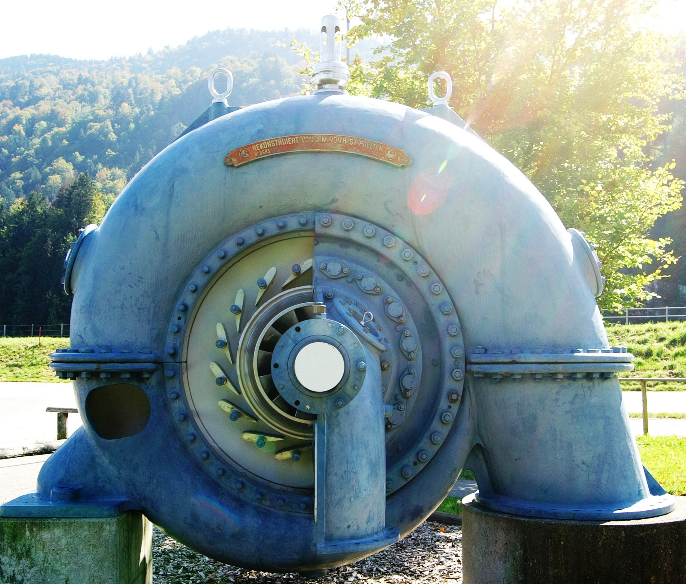 Kraftwerk der Vorarlberger Kraftwerke in Andelsbuch Jugendstil-Stufengiebelbau der Vorarlberger Kraftwerke von 1908. Mit der damaligen Leistung von 10.000 PS war es das größte Elektrizitätswerk Österreichs. Gesamtkomplex mit Stausee, Wehranlage, Druckrohrleitung, Umspannwerk, Unterwasserkanal und Krafthaus mit fünf Turbinen. 51 Mio kWh Jahreserzeugung.